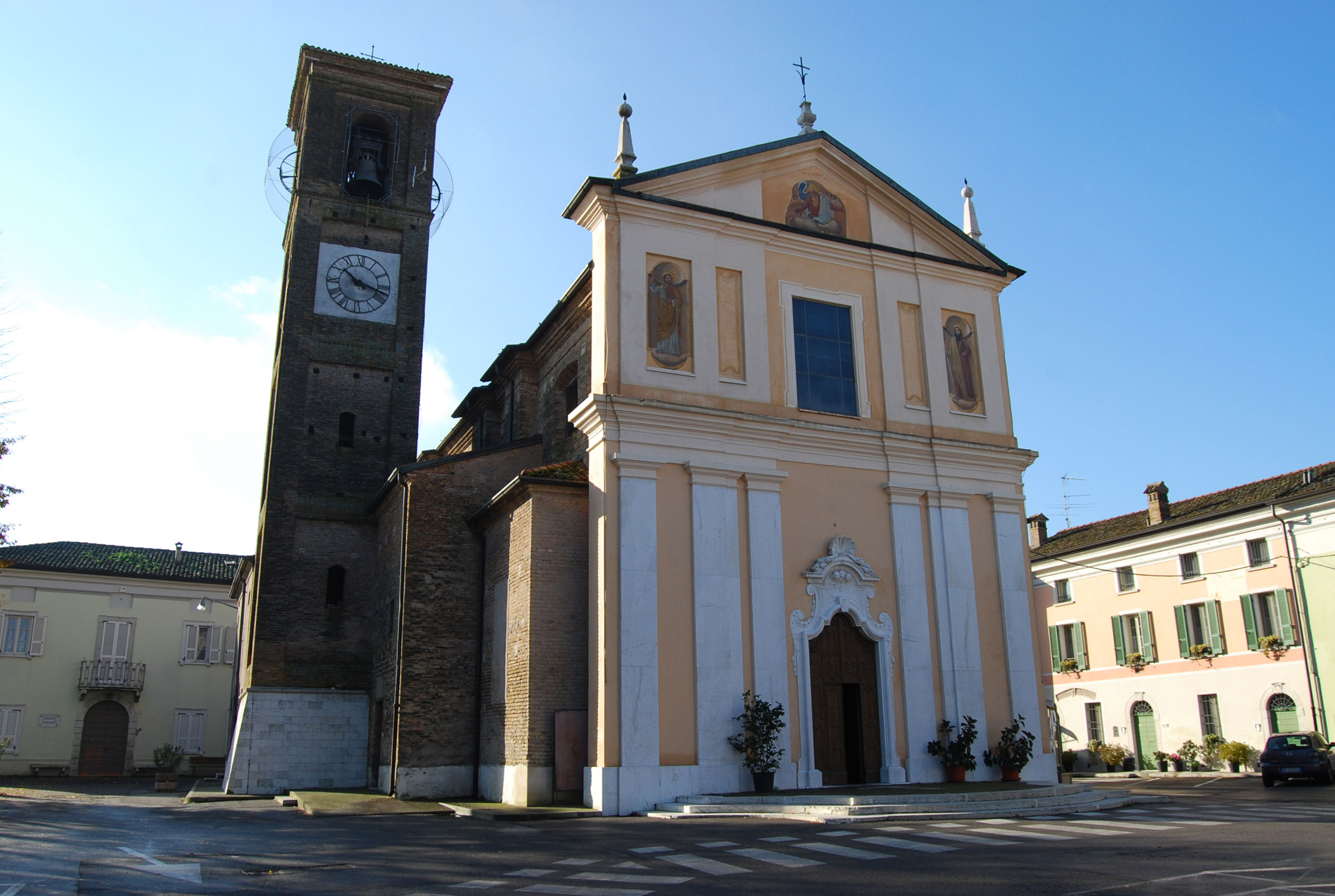 Visano, chiesa.